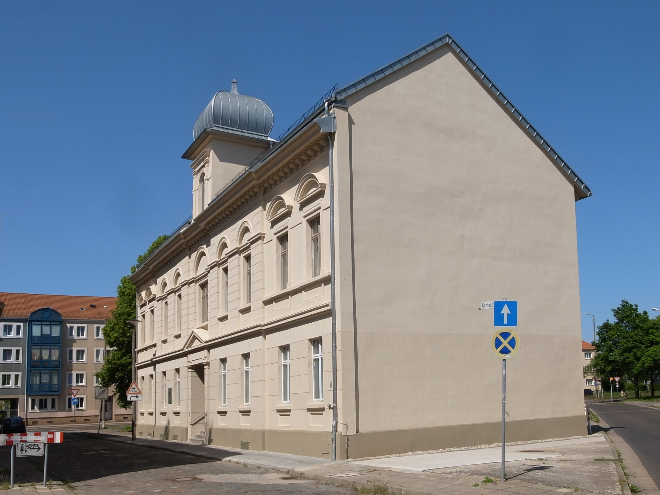 Dessau, Rabbinerhaus, auch als Kantorhaus bezeichnet, wurde 1889 errichtet. Es ist heute das religiöse und kulturelle Zentrum der Dessauer Jüdischen Gemeinde